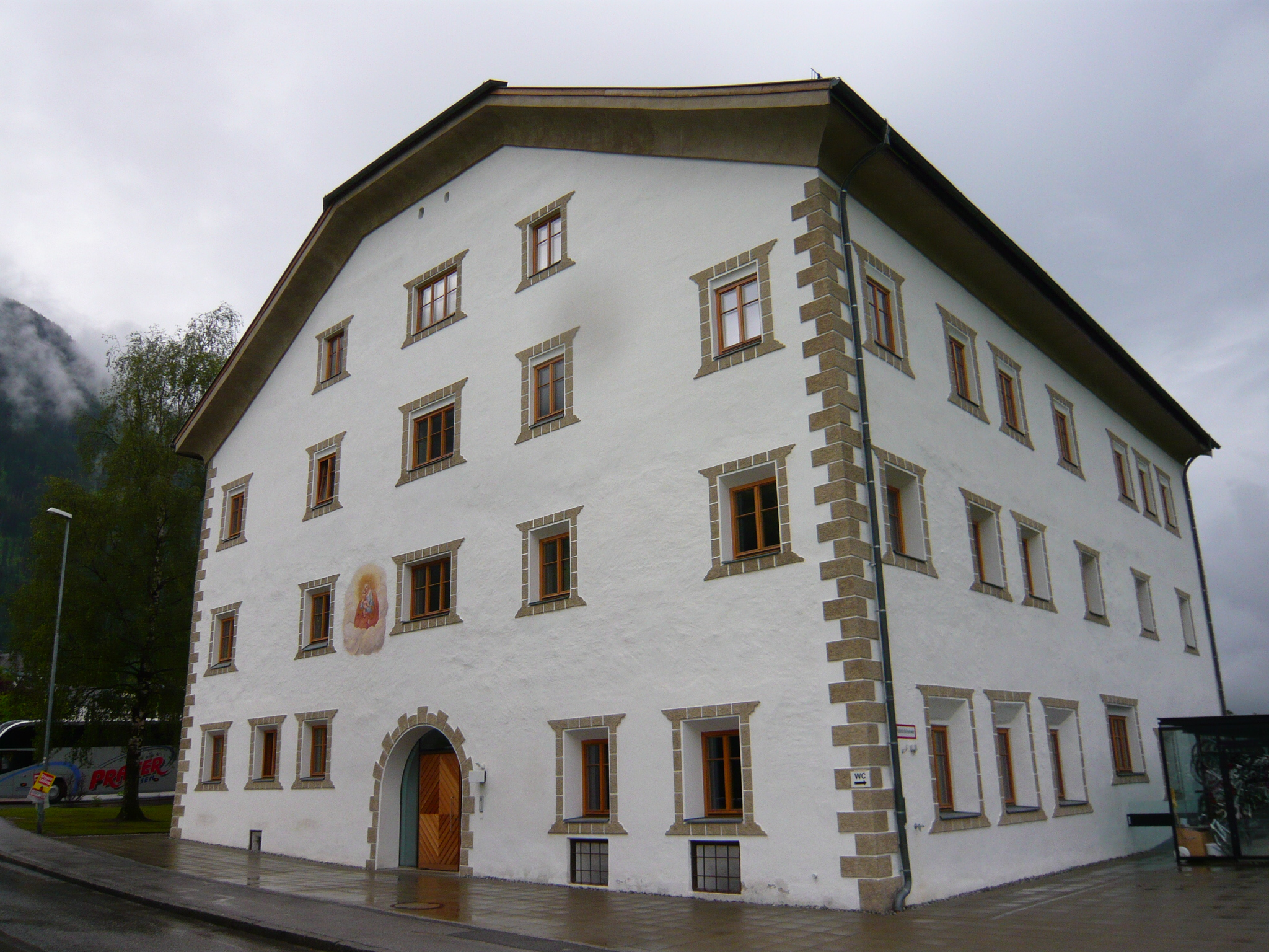 Ehem. Gasthof Speckbacher, Mädcheninternat des Schigymnasiums - Wirtsgasse 1, Stams